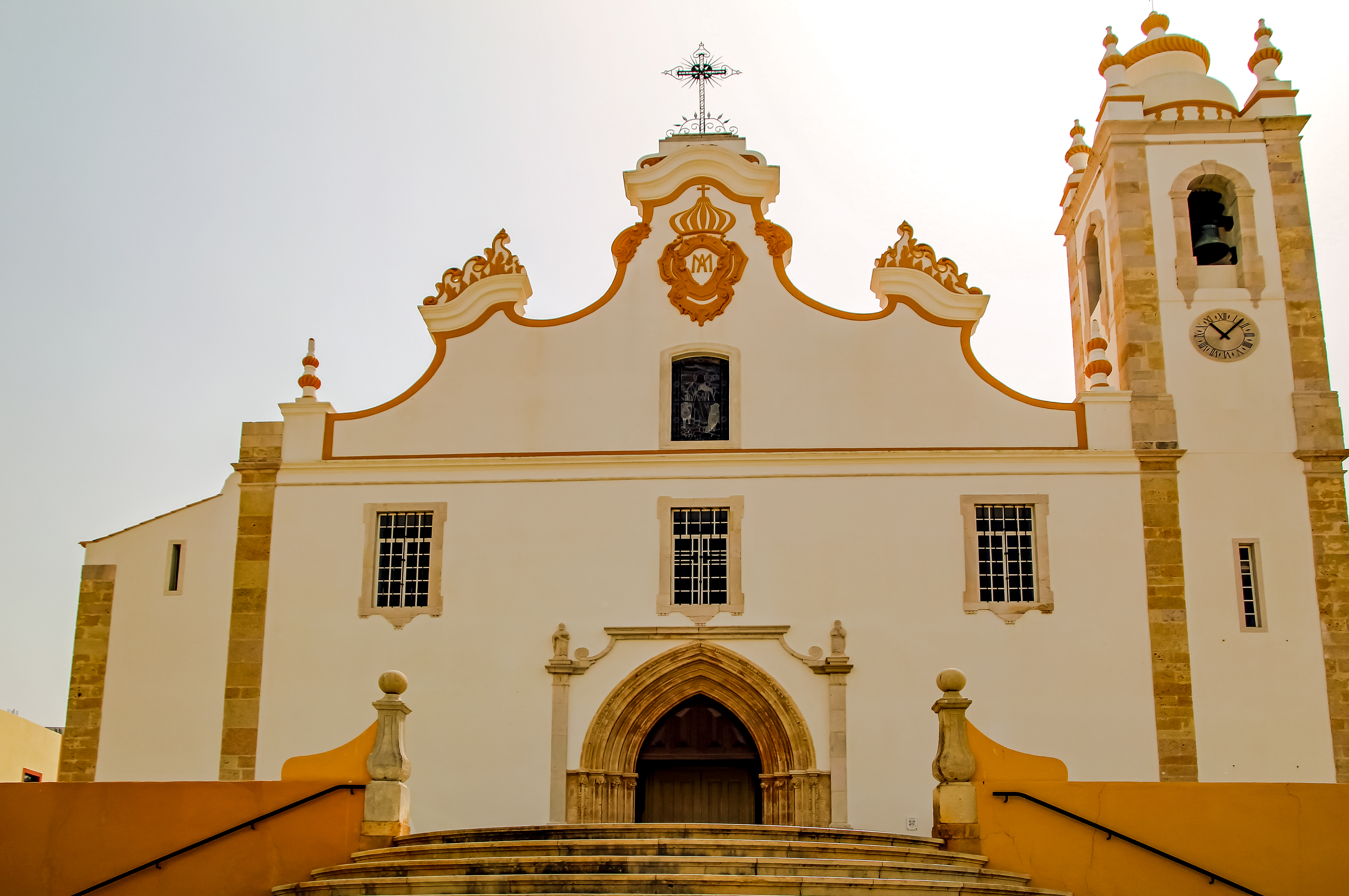 Portimao es una ciudad portuguesa del distrito de Faro, el región del Algarve.